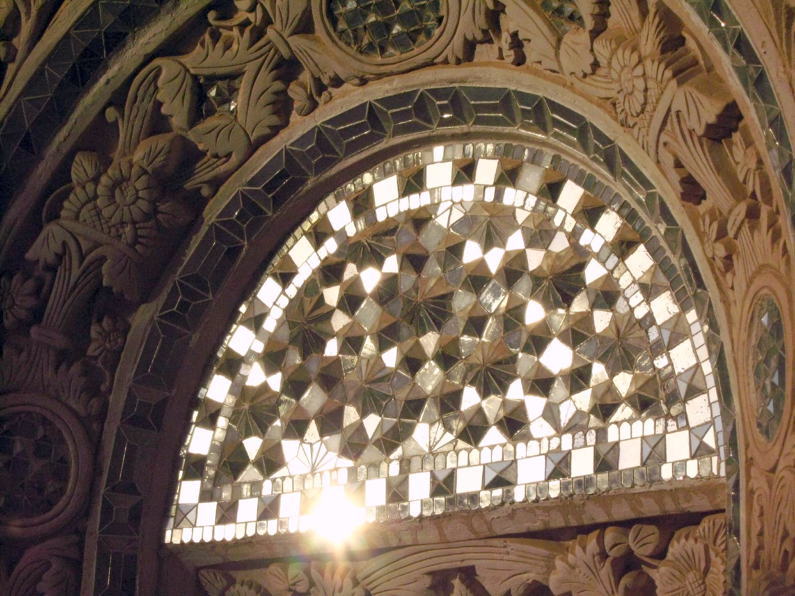 ایران-کاشان